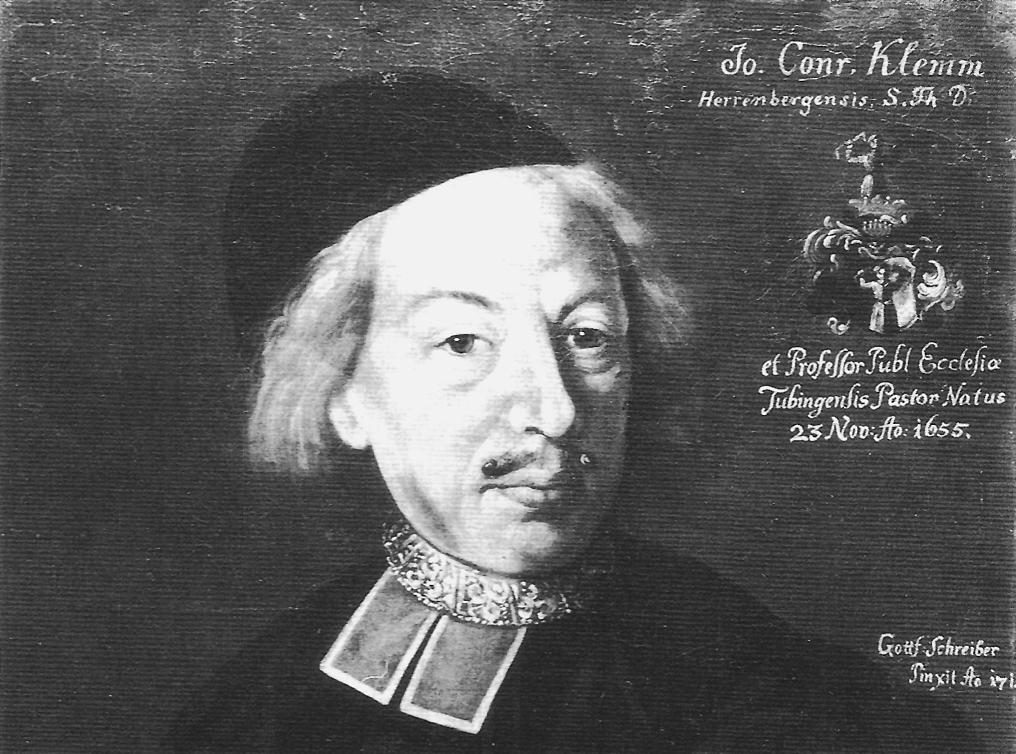 Theologieprofessor Johann Conrad Klemm (Öl auf Leinwand; Gemälde in der Professorengalerie Tübingen; Ausschnitt)